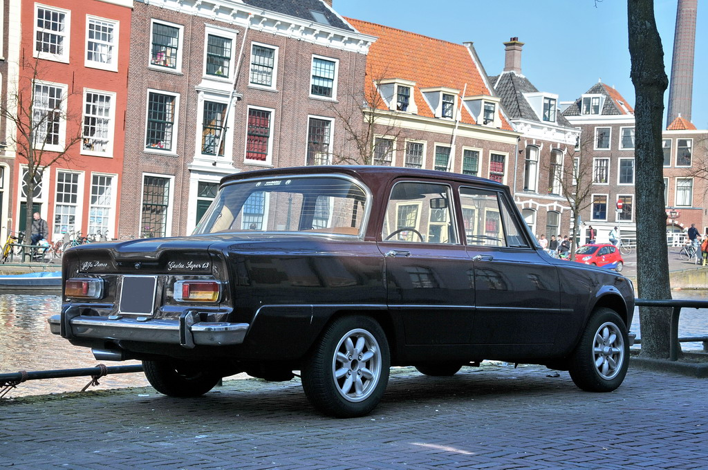 Leiden